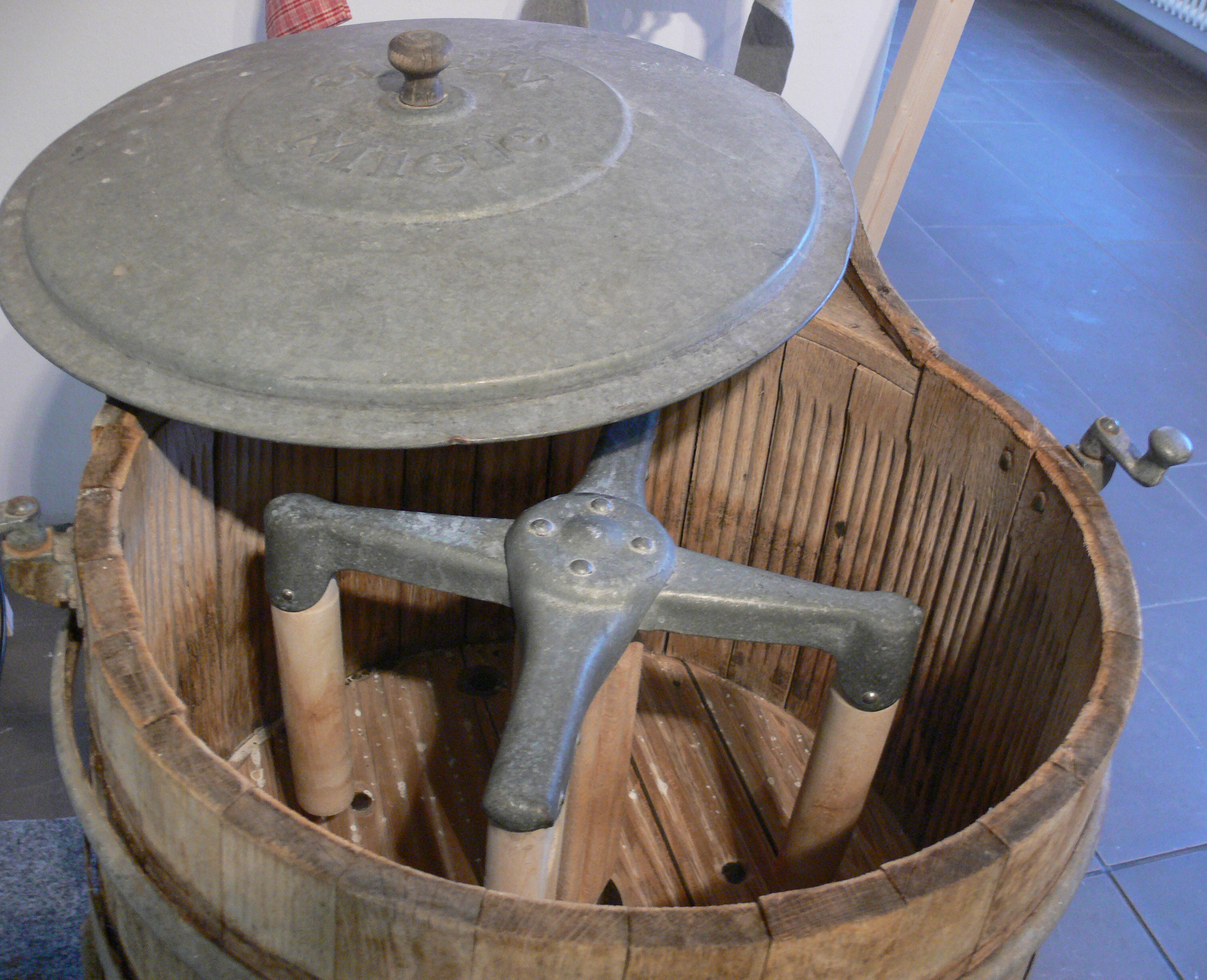 Landesmuseum Württemberg (Außenstelle Museum für Volkskultur in Württemberg, Waldenbuch)